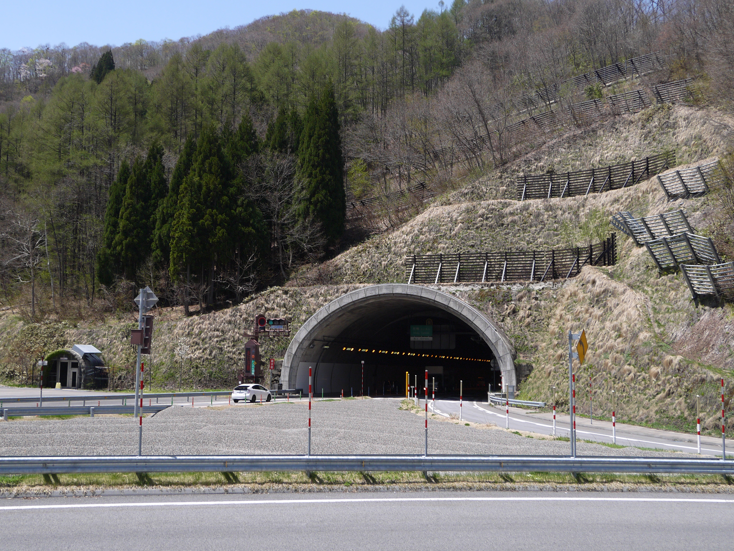 東海北陸自動車道 飛騨トンネル（河合坑口） 本坑と避難坑